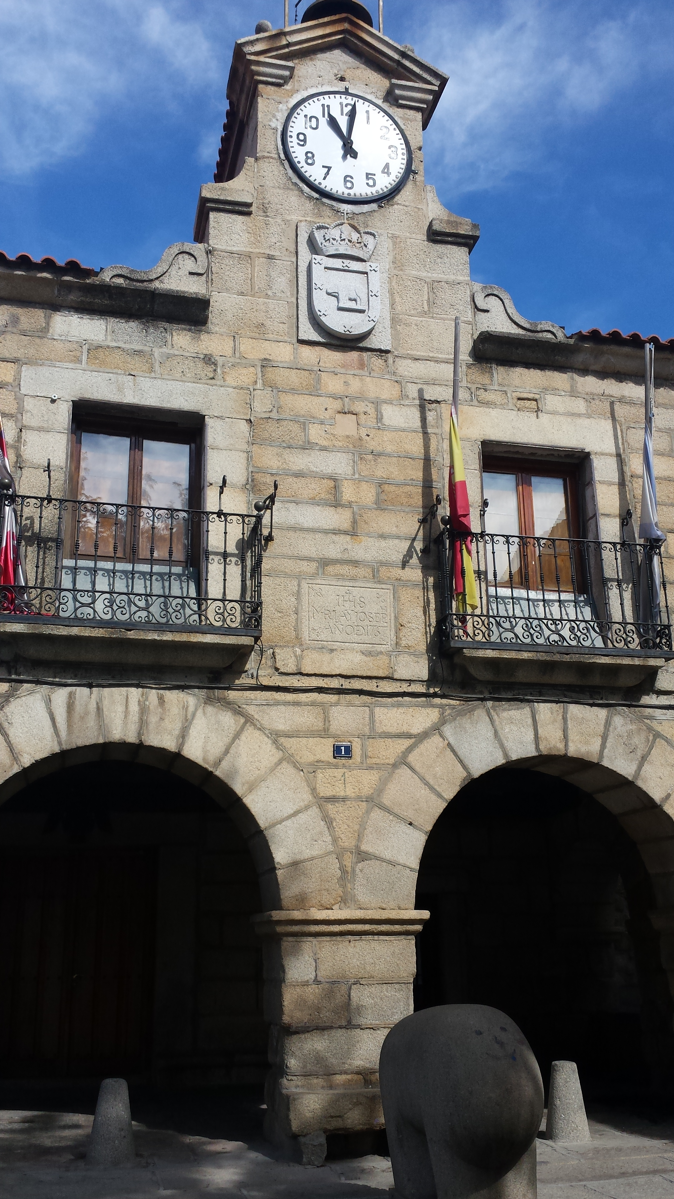 Ayuntamiento El Barraco , Ávila, España.